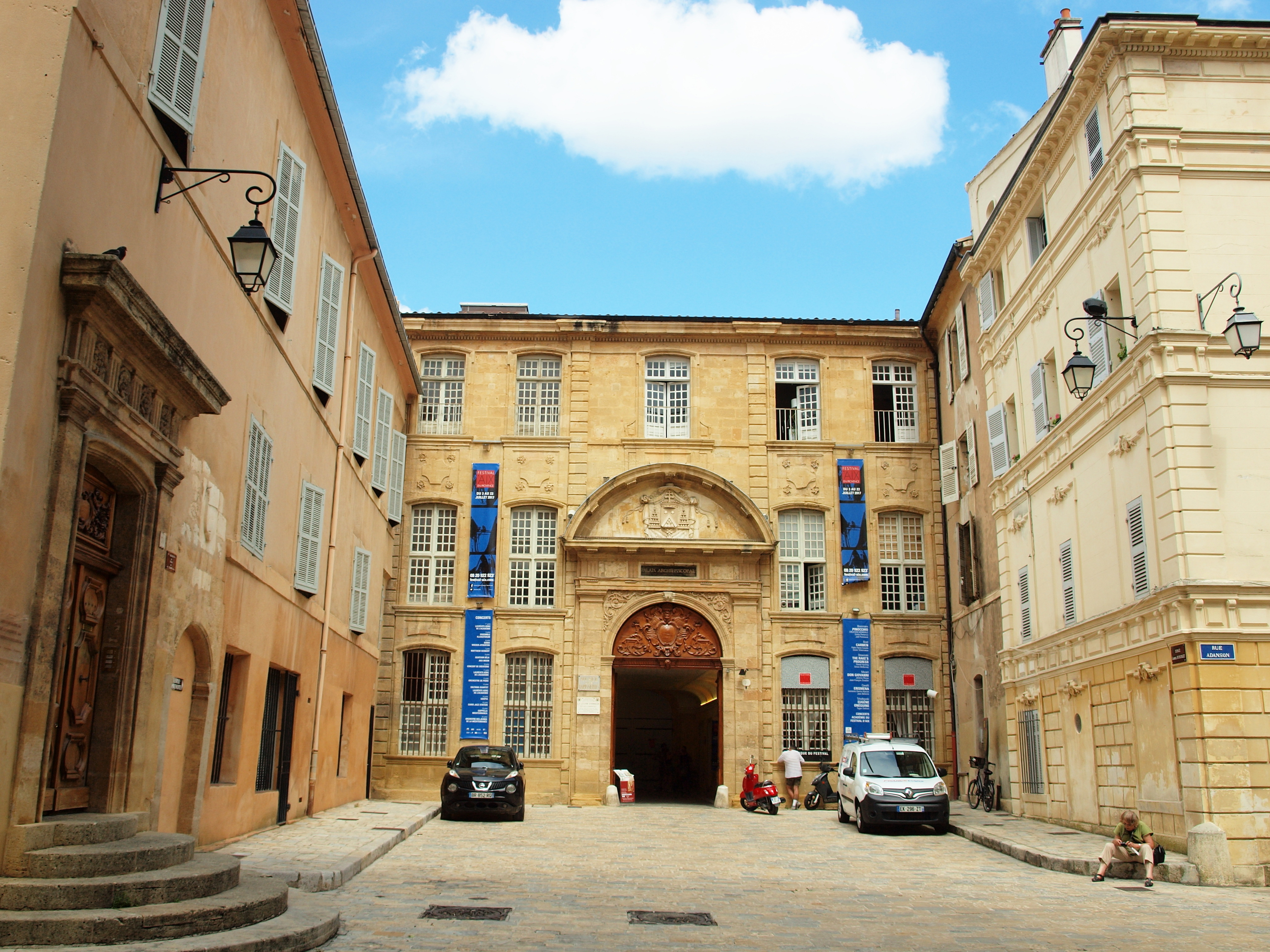 Palais archiépiscopal d'Aix-en-Provence (Bouches-du-Rhône, France)